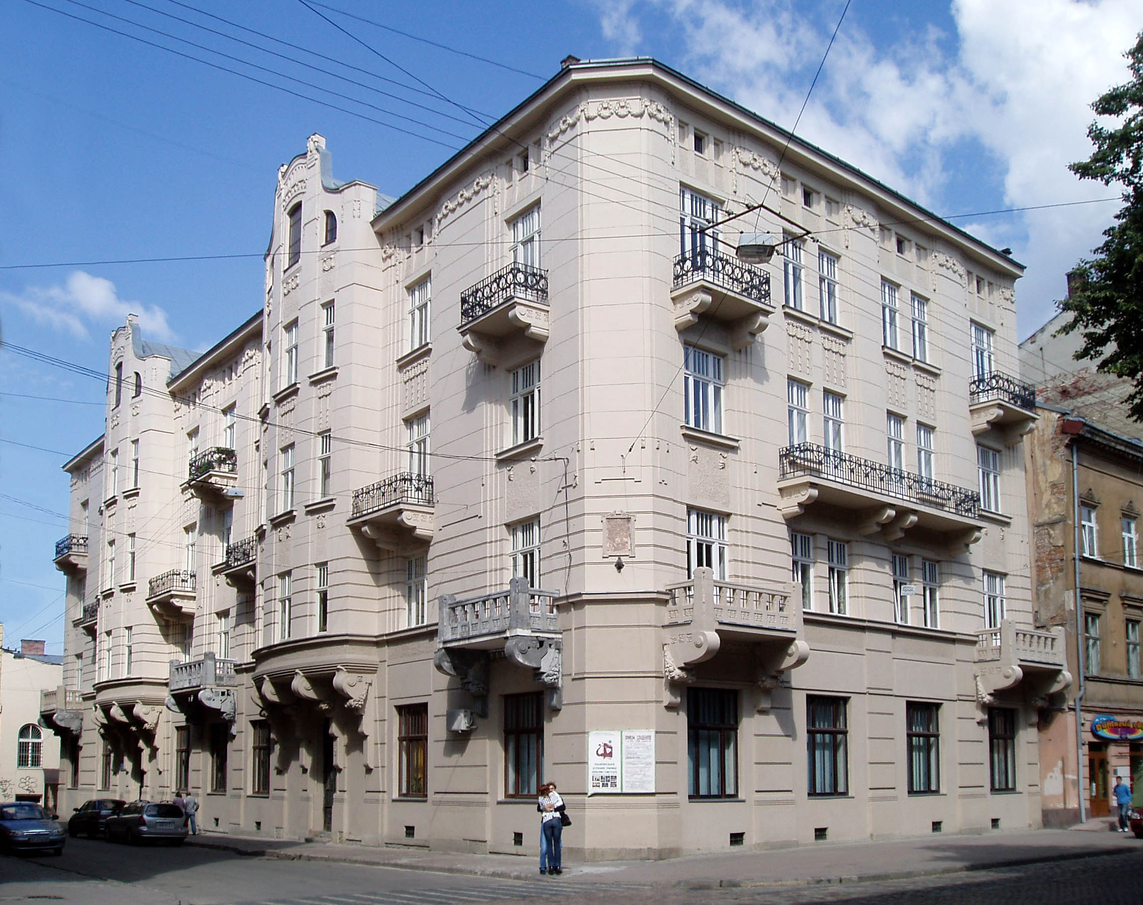 Будинок на вулиці Князя Романа у Львові. Збудований 1908 року за проектом Тадеуша Обмінського (1874-1932).